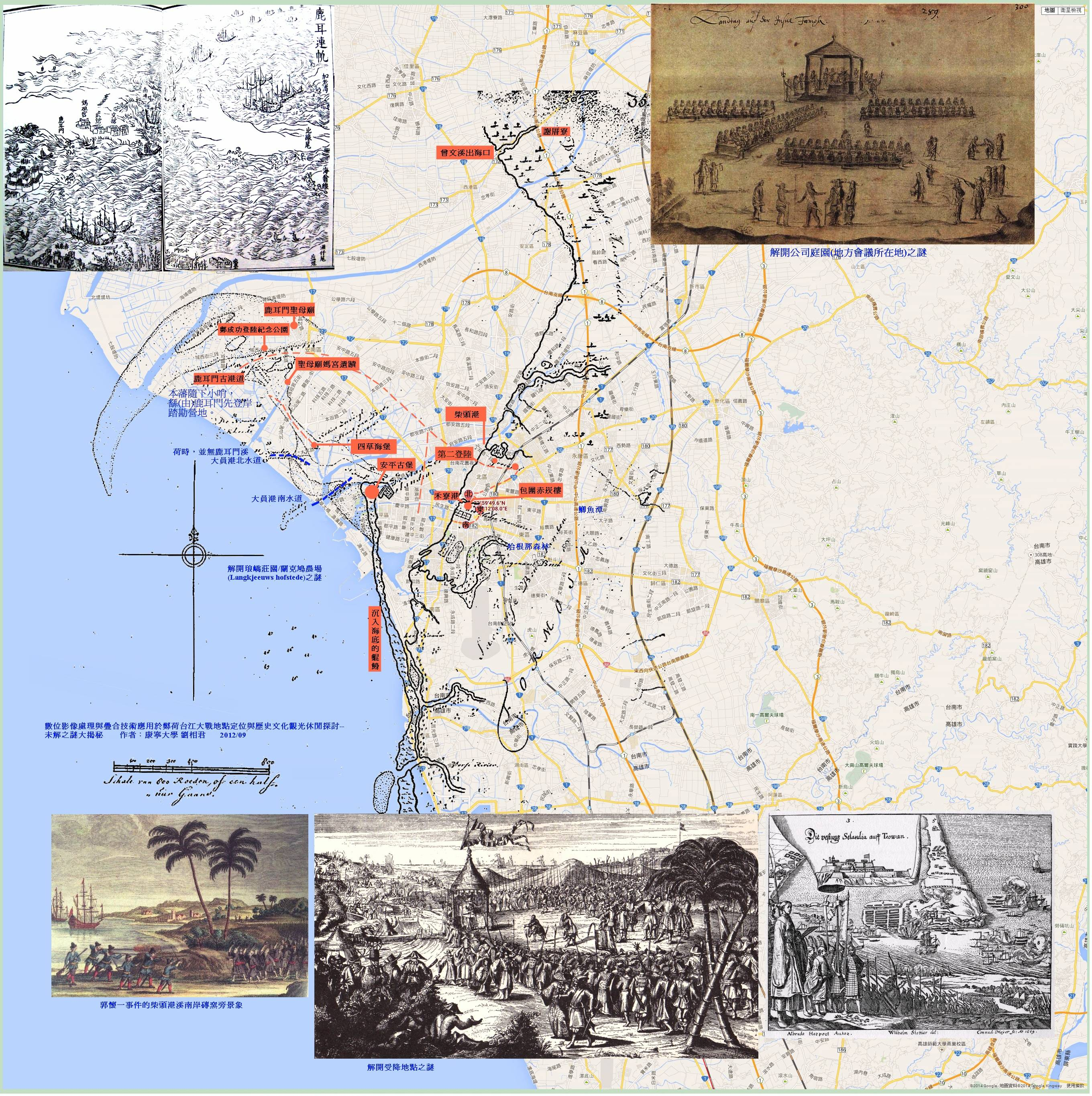 、鄭成功紀念公園、鄭成功登陸地點、鄭成功登陸鹿耳門紀念碑、鄭成功登陸鹿耳門紀念公園。鄭成功攻台之役，1652年Cornelis Jansz Plockhoy所繪的「大員及其附近地區海圖」與2012 google地圖疊合加以呈現。